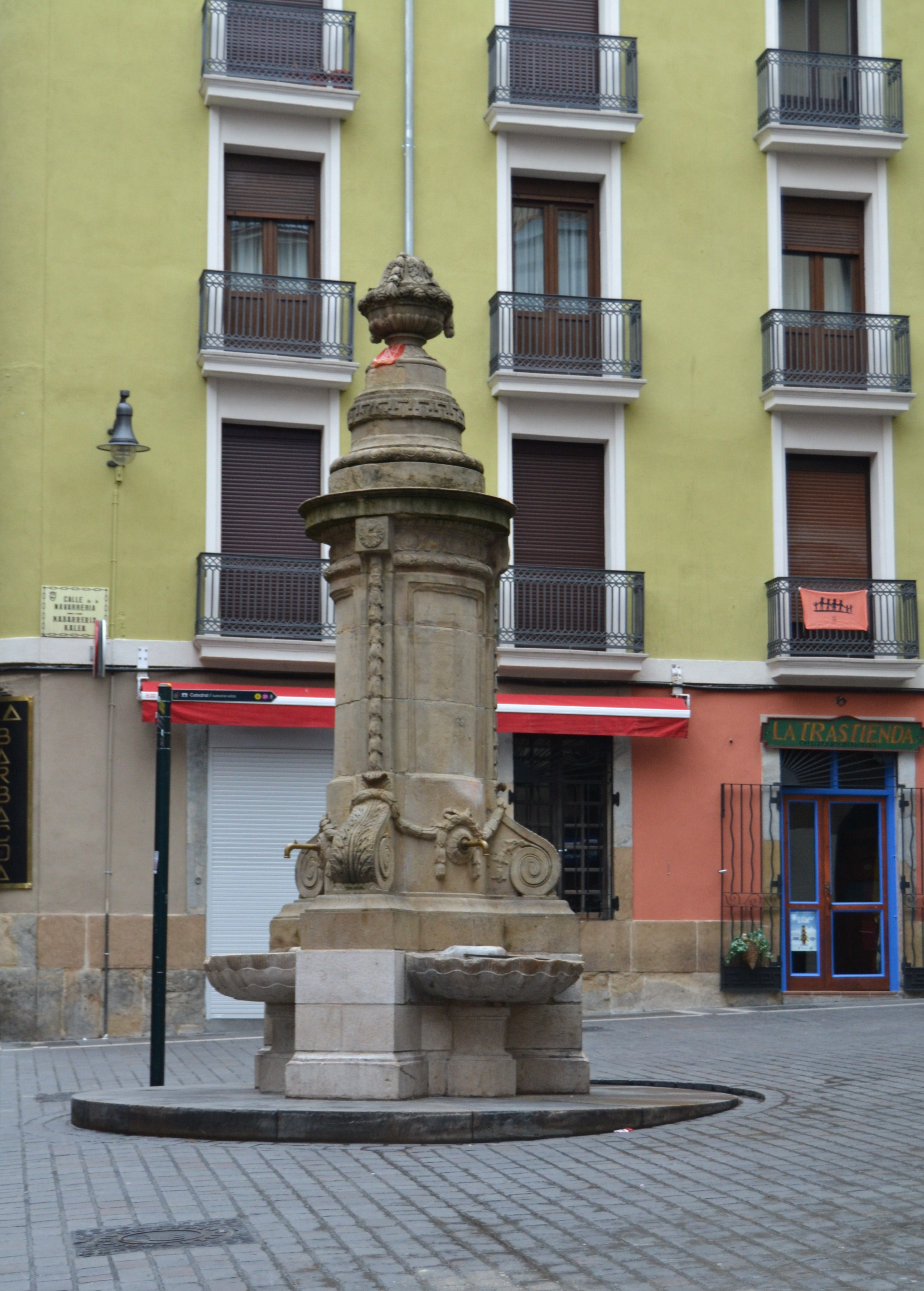 Nabarreriako iturria.